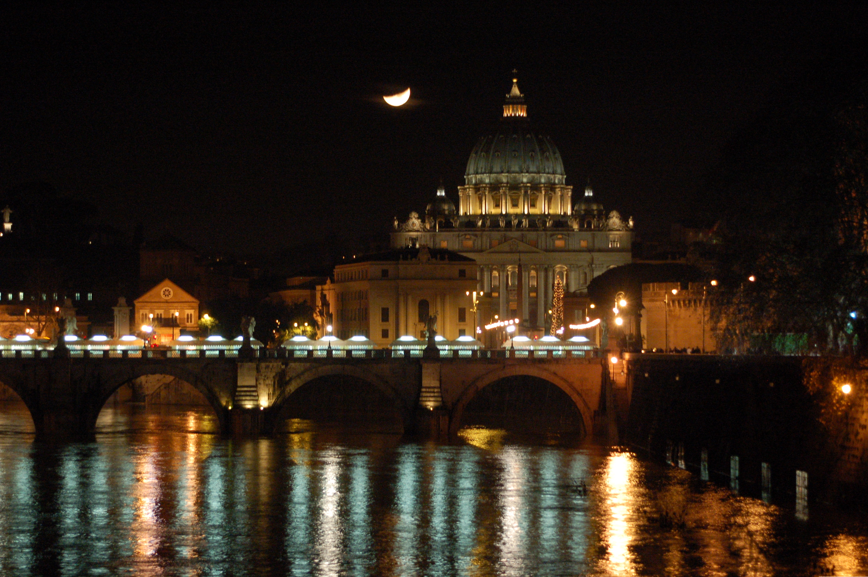 La Basilica di San Pietro e Ponte Sant'Angelo - Vista notturna